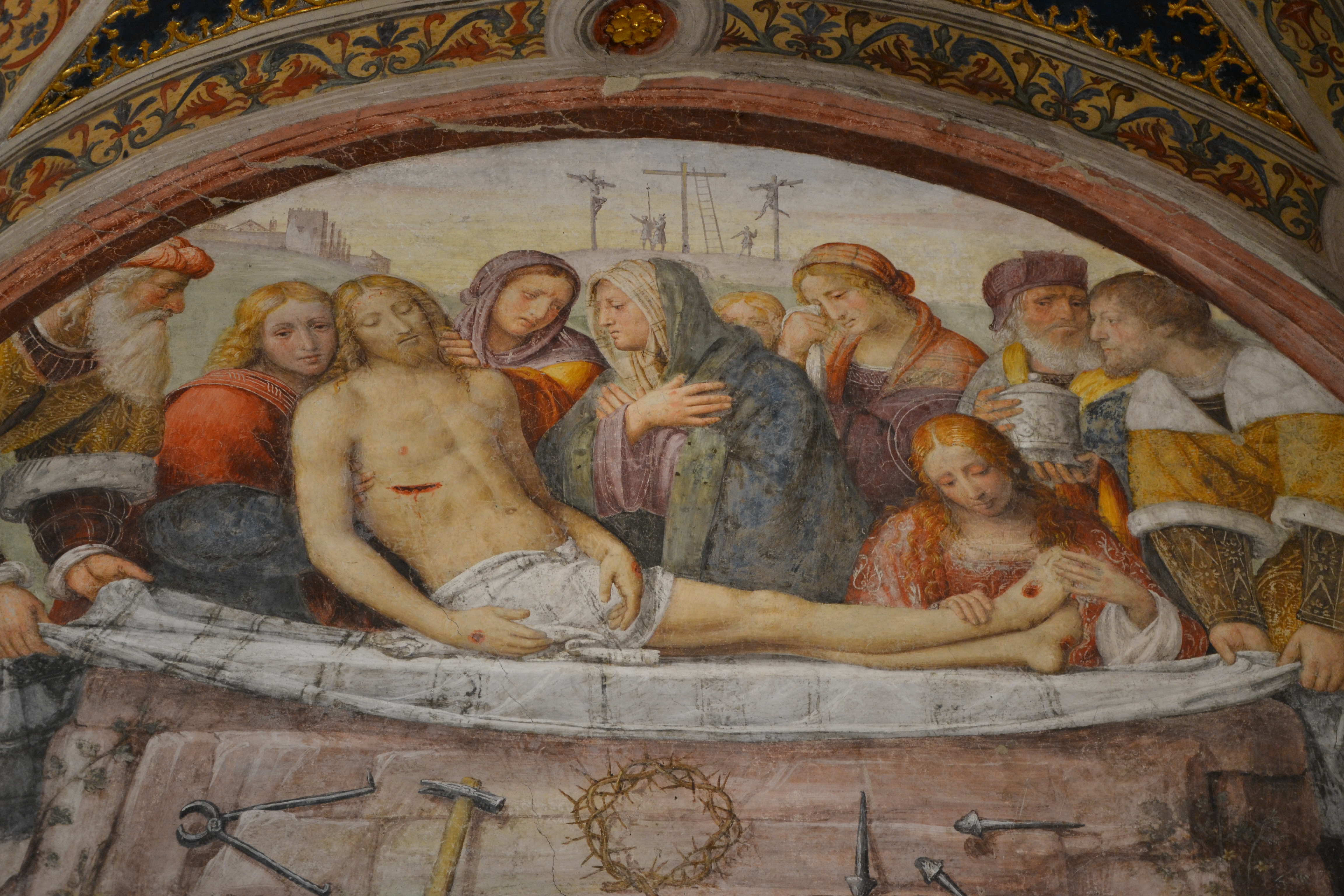 Milano - San Maurizio al monastero maggiore, aula delle monache, Affreschi di Bernardino Luini, del XVI secolo